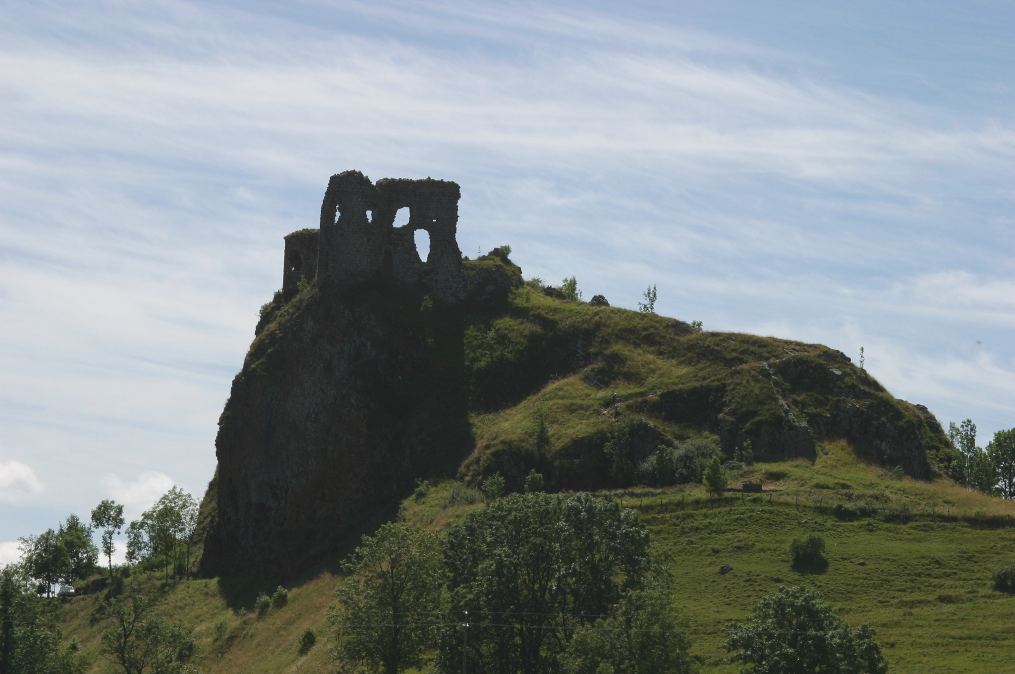 Vue d'ensemble des ruines du chateau d'Apchon